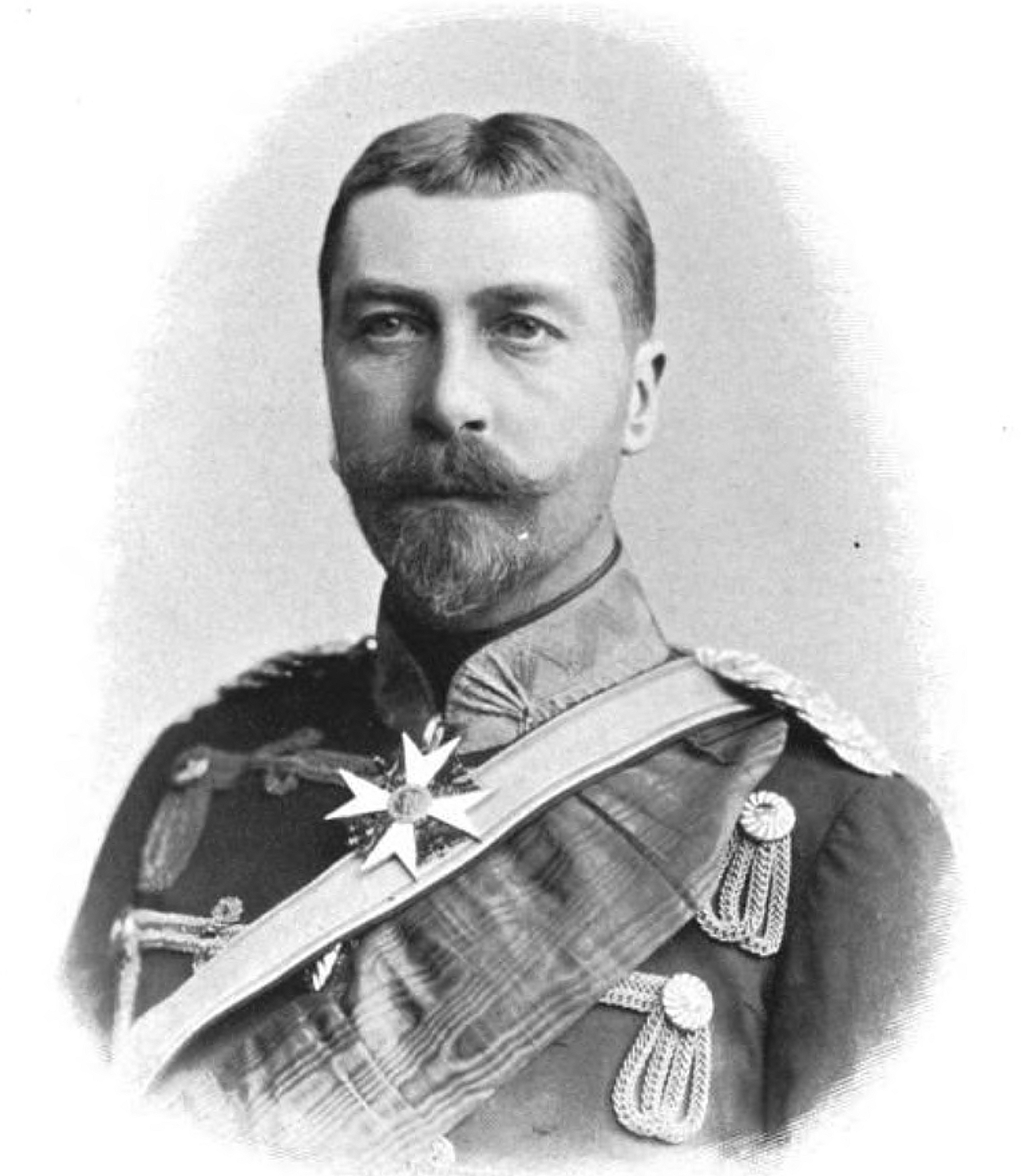 'Seine Hoheit Herzog Ernst Günther von Schleswig-Holstein'